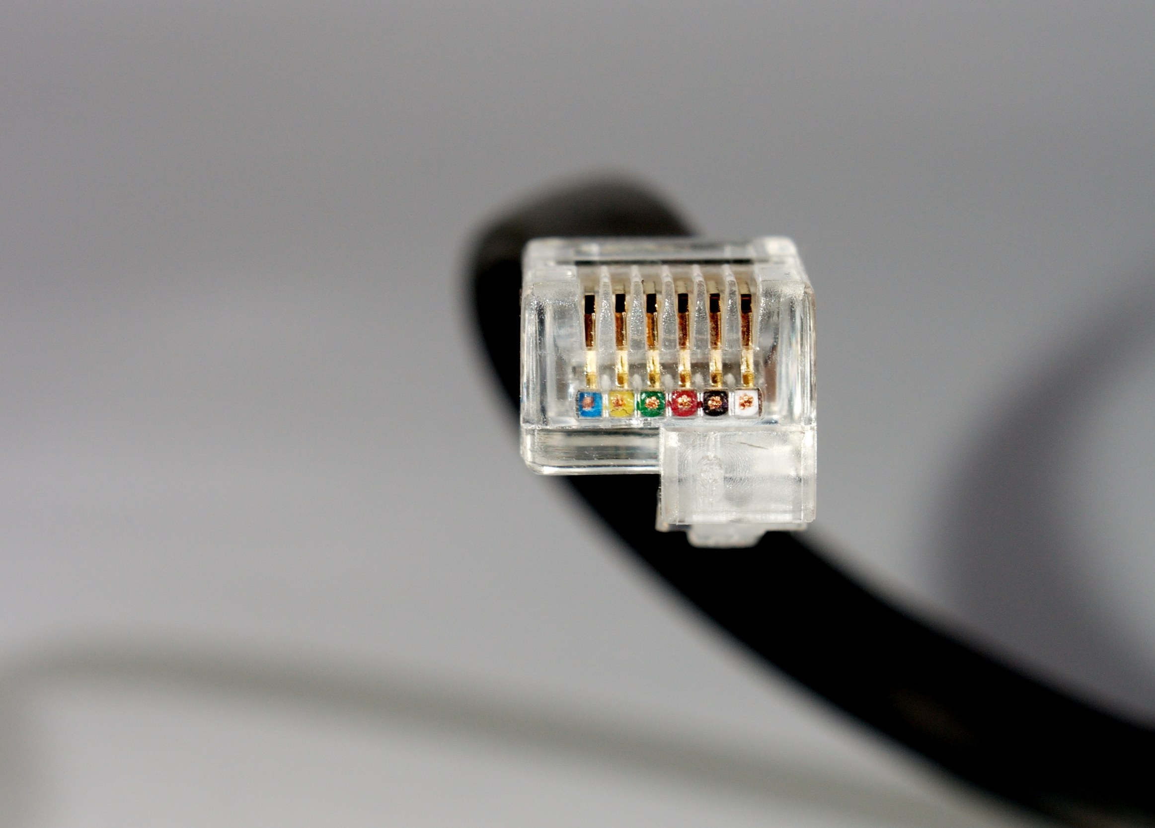 Lego Mindstorms NXT Kabel eines NXT-Bausatzes der ersten Generation.